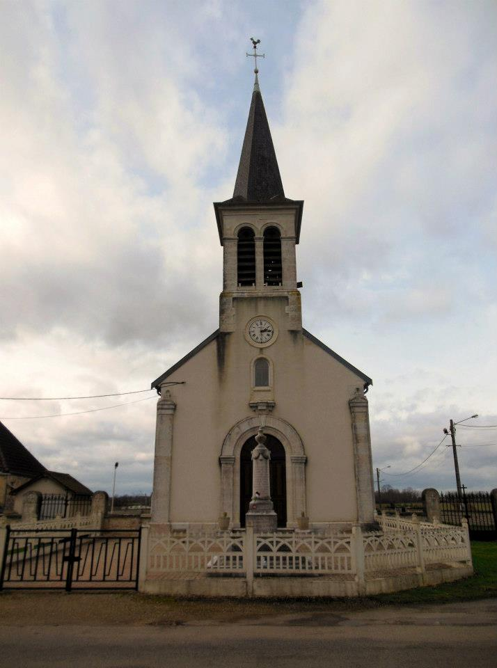 Photographie de la façade de l'église de la Nativité de la Vierge de Samerey (Côte-d'Or)